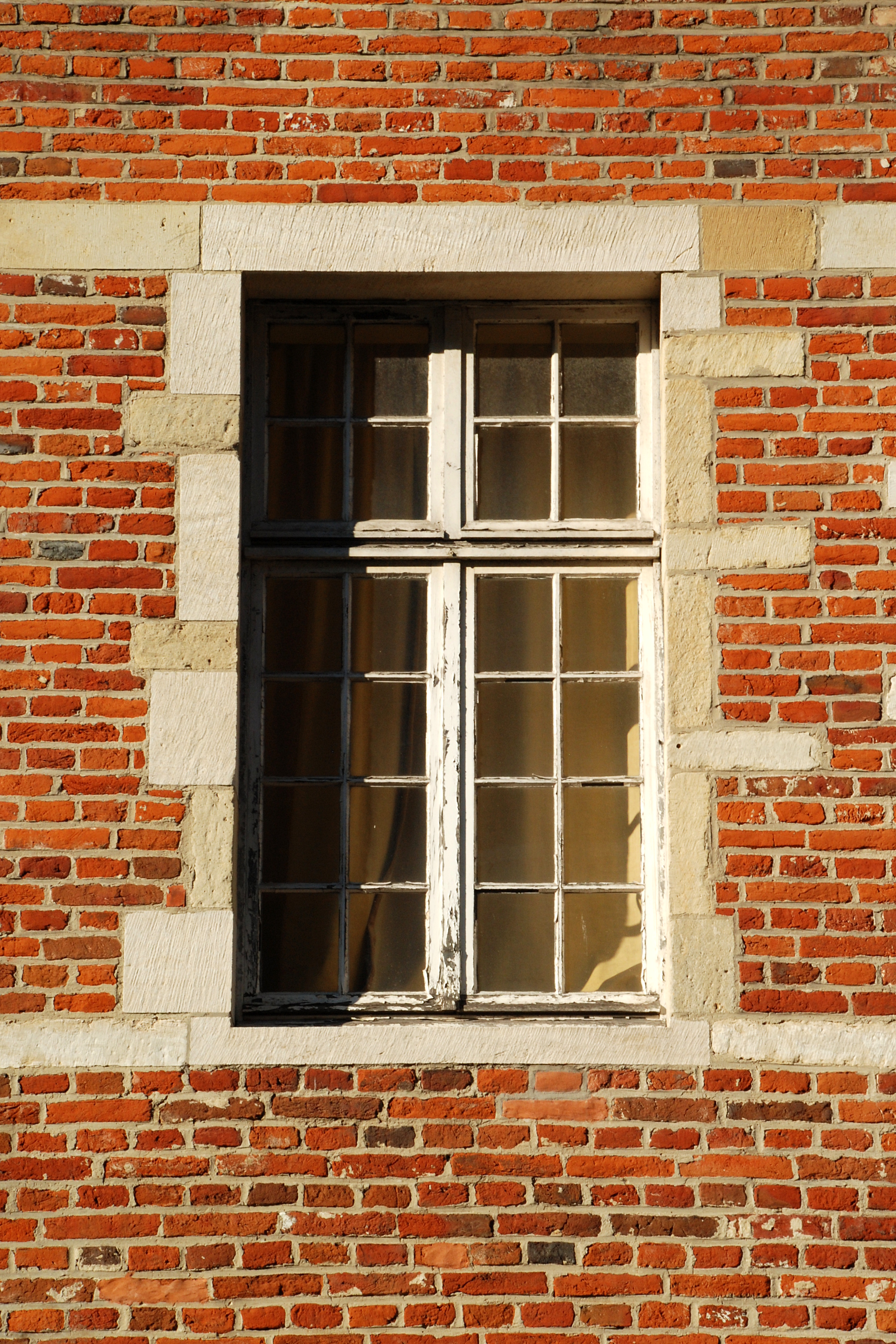 Belgique - Bruxelles - Chapelle Sainte-Anne de Bruxelles